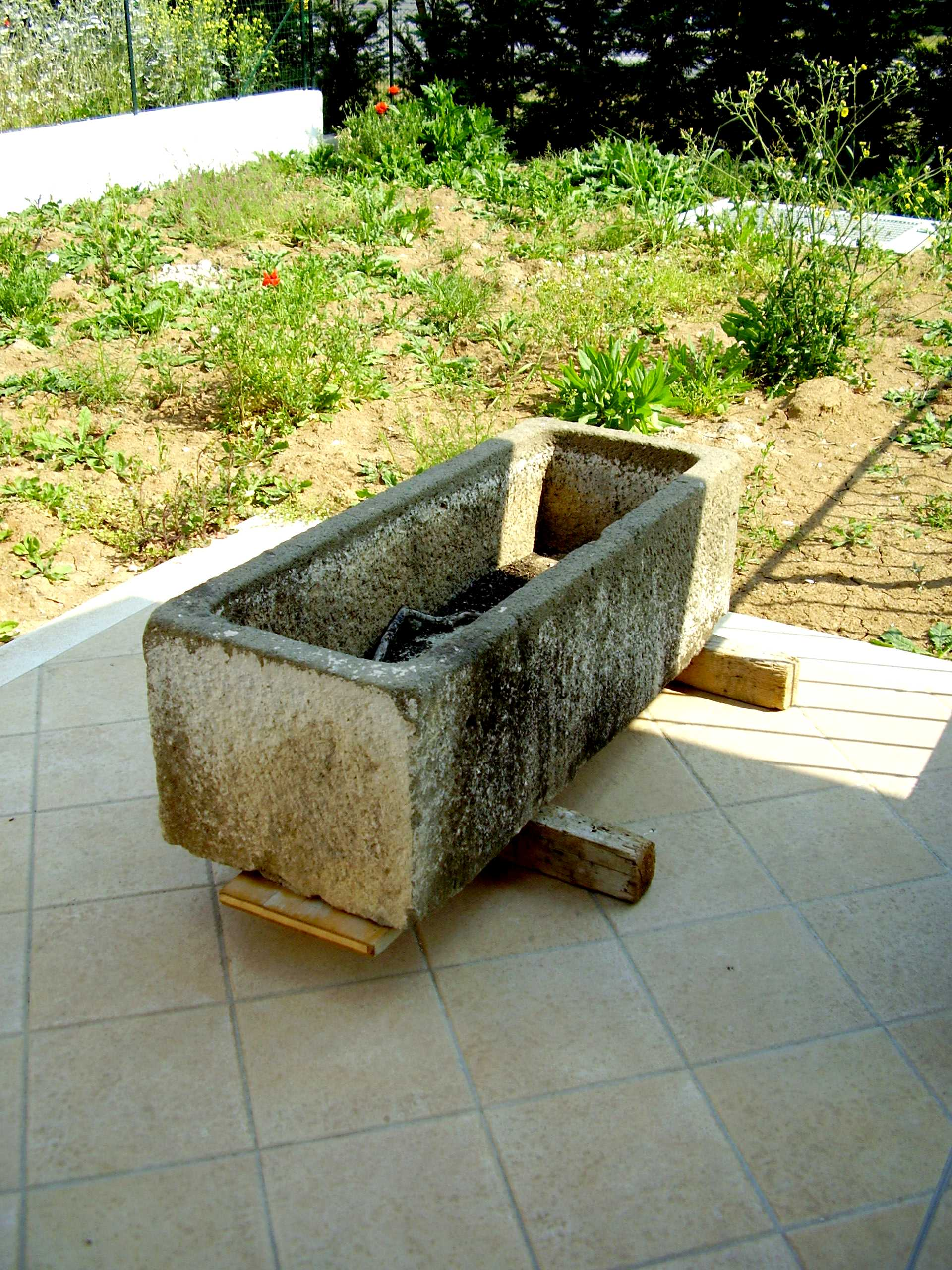 Vasca in pietra trachite monolitica, di epoca altomedievale o romana, Veneto Orientale (Italia)